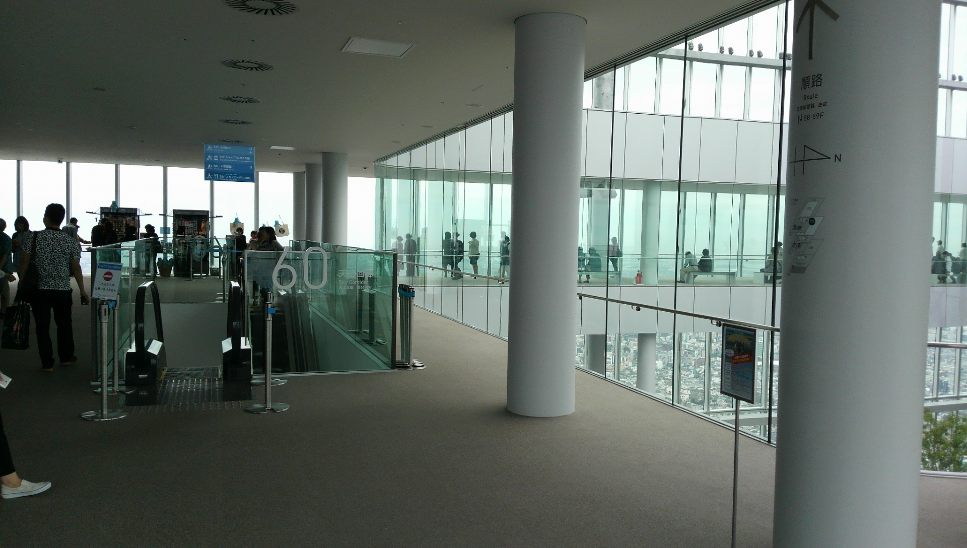 大阪市阿倍野区に位置するあべのハルカス60階のエスカレーター付近。